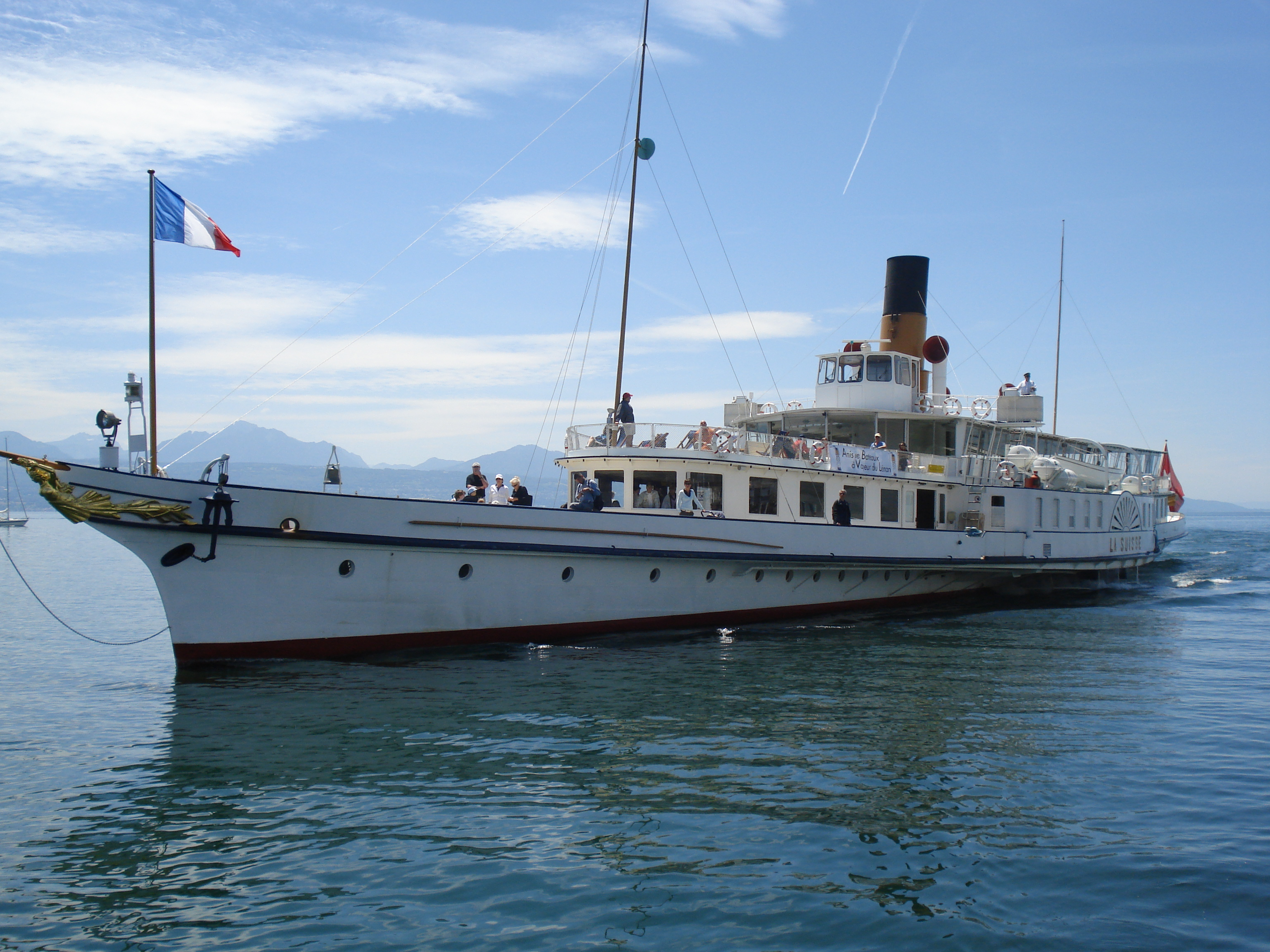 Steamboat La Suisse